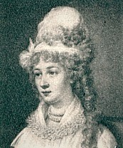 Marie Thérèse de Choiseul-Stainville (1767-1794), princesse de Monaco